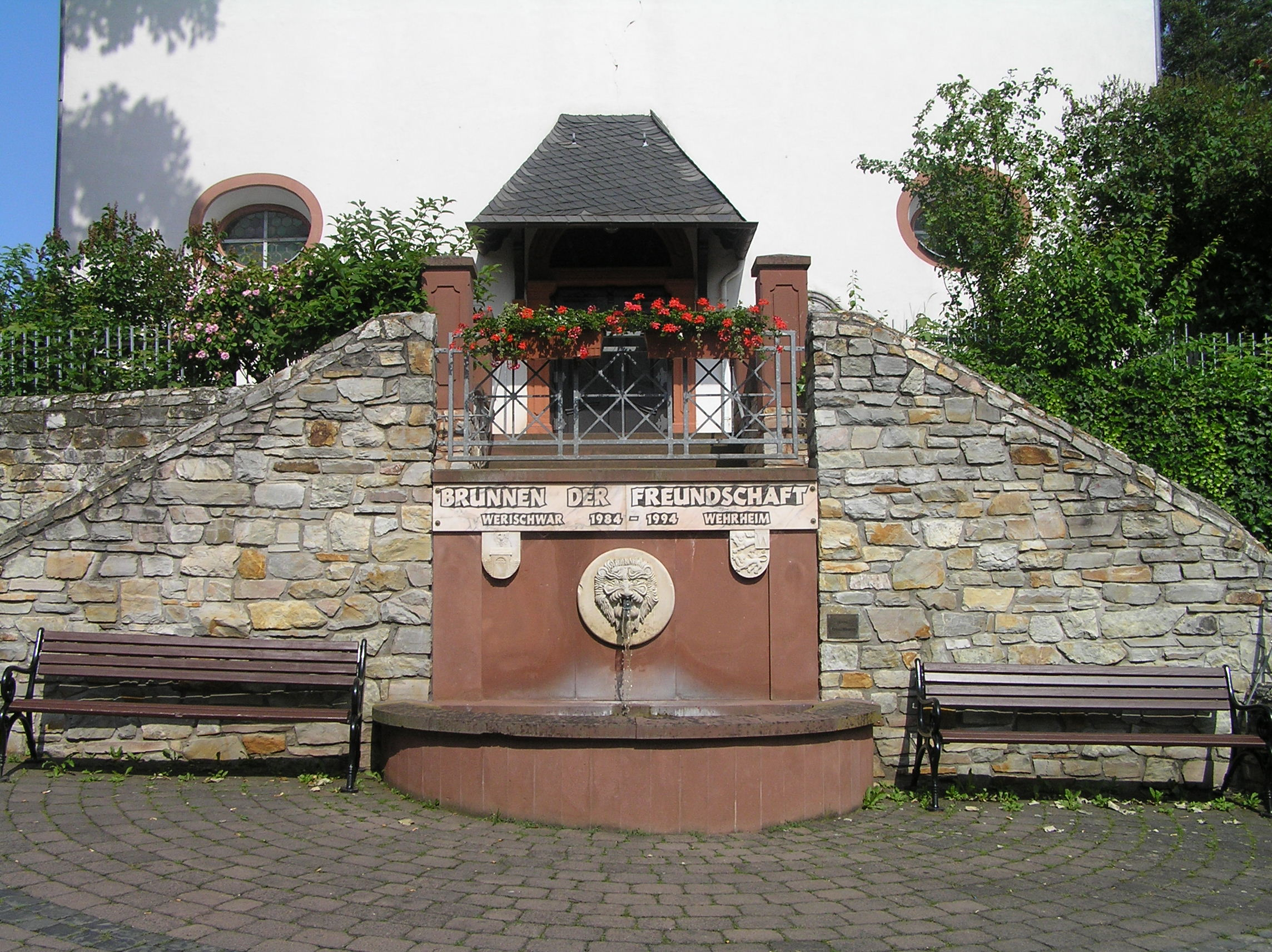 Wehrheim, Brunnen der Freundschaft, errichtet 1994 anläßlich des 10jährigen Jubiläums der Städtepartnerschaft mit Werischwar (ung:Pilisvörösvár). Der Brunnen befindet sich unterhalb der evangelischen Kirche neben dem Rathaus.